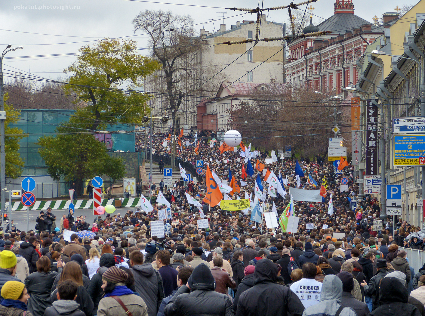 Массовое антипутинское шествие в поддержку узников «6 мая» и других политзаключённых. Москва, 27 октября 2013 года, Бульварное кольцо, Рождественский бульвар.